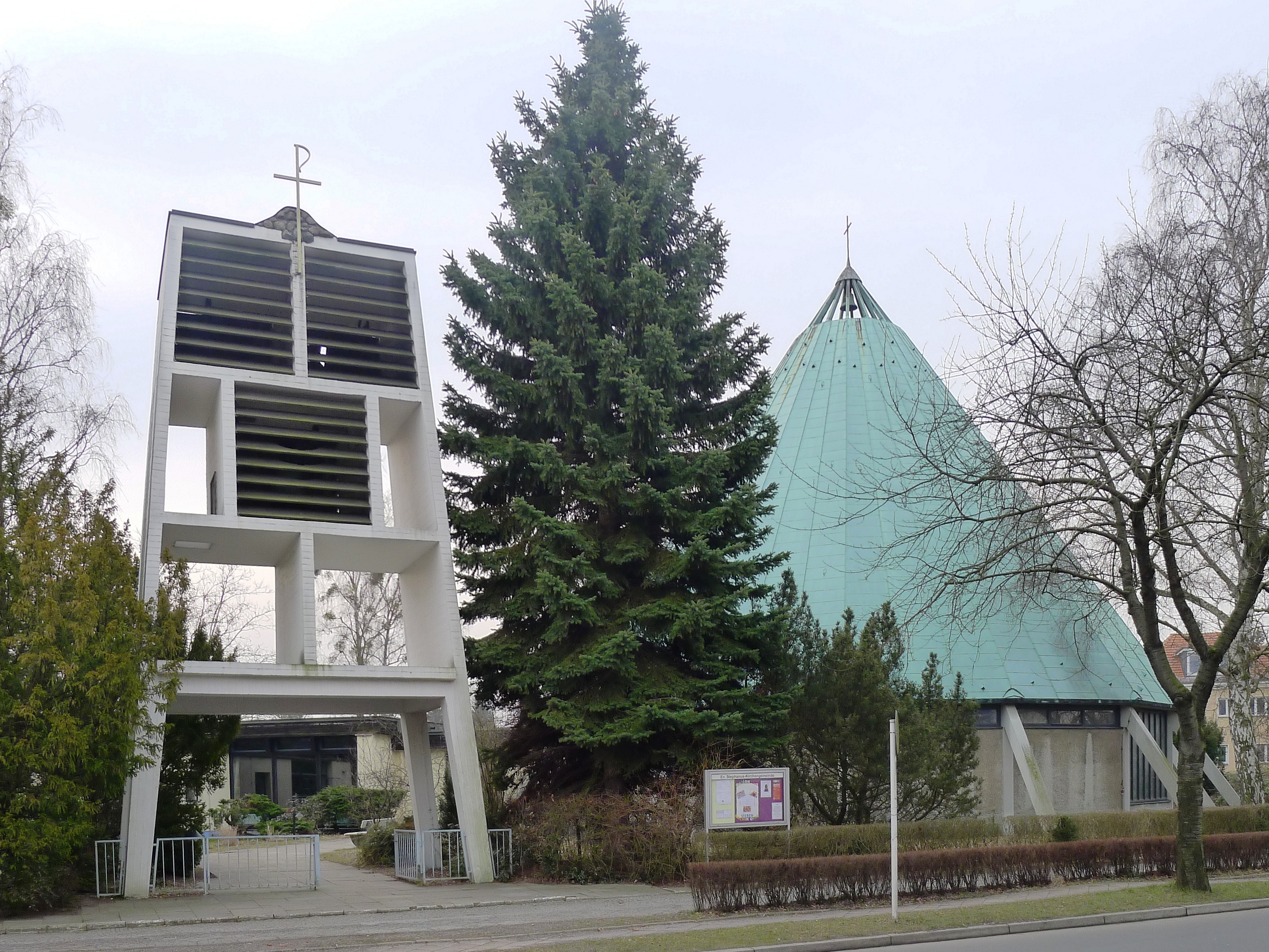 Blick auf Campanile und Kirche